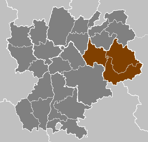 Maps of arrondissements and cantons of France: Département de la Savoie.PNG (Région Rhône-Alpes)